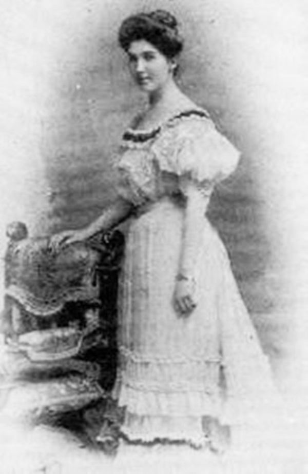 Foto antiga da condessa Elisabeth Dobrzensky de Dobrzenicz, na época de seu noivado com o príncipe D. Pedro de Alcântara, em 1900.